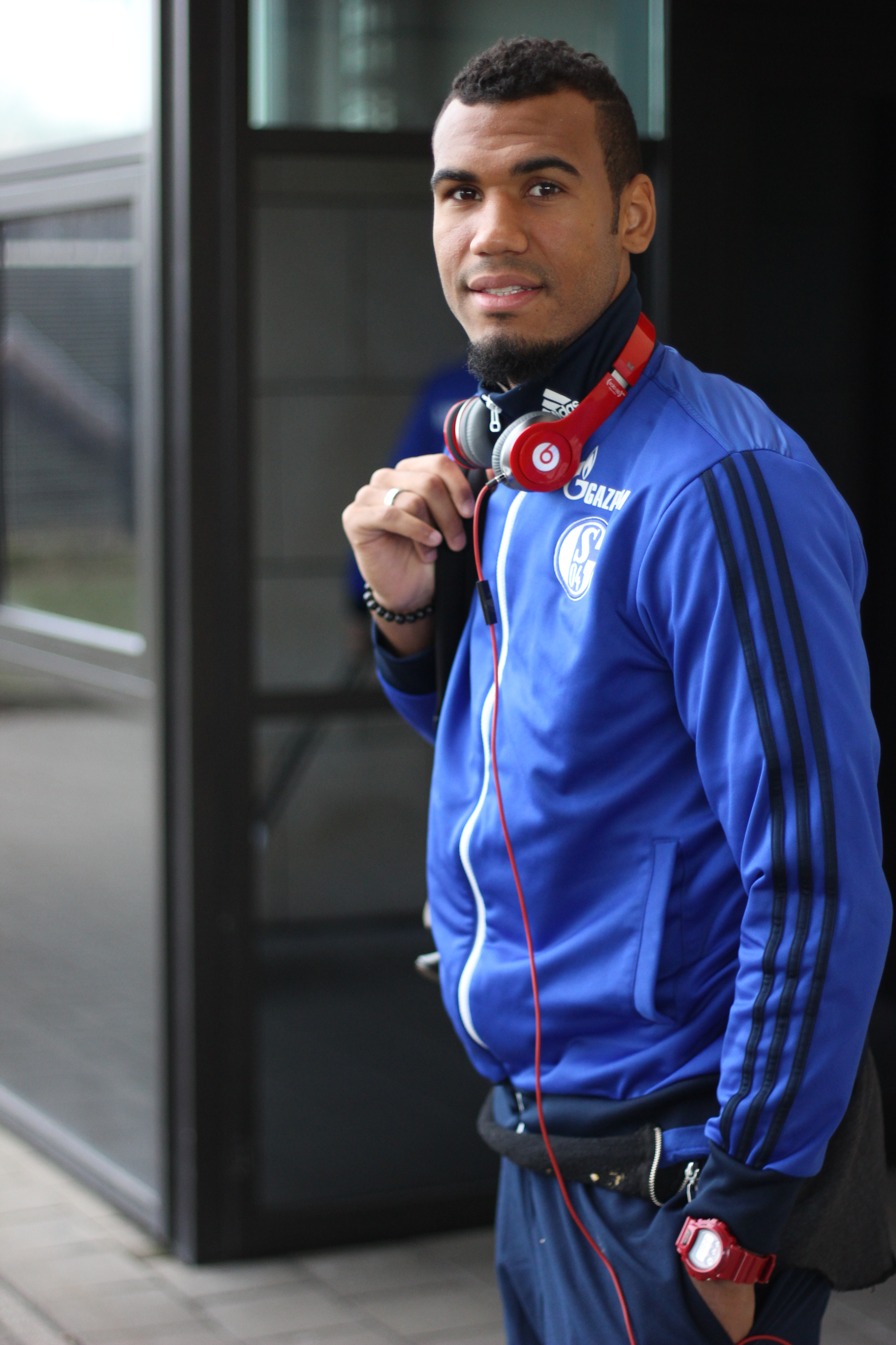 Schalke 04